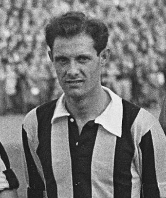 Gerrit Jansen.